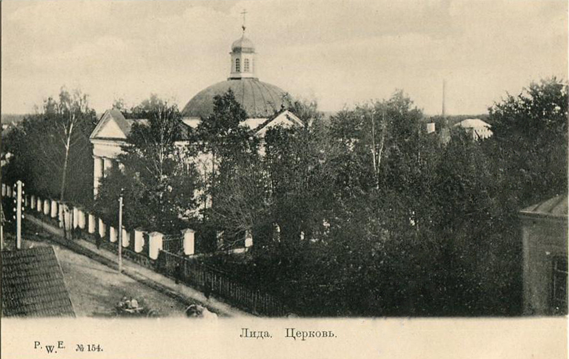 Беларуская (тарашкевіца): Ліда (Lida), рог вуліц Віленскай (vulica Vilenskaja) і Школьнай (vulica Školnaja). Касьцёл Сьвятога Язэпа і кляштар піяраў